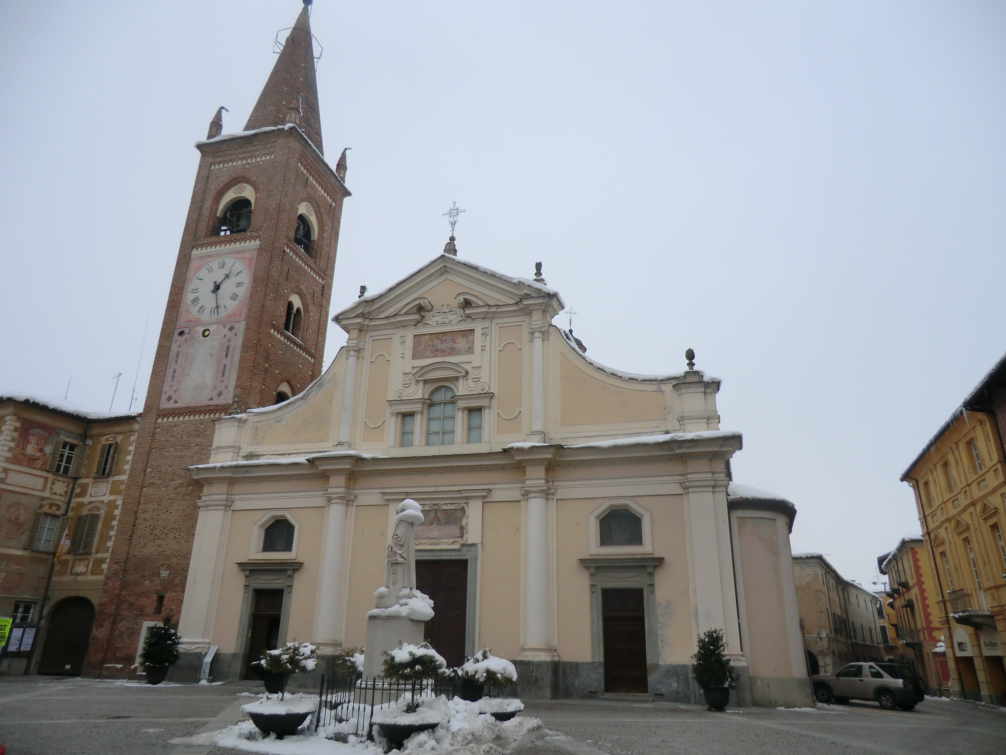 Bene Vagienna (Cuneo): Chiesa parrocchiale di Santa Maria Assunta (sec. XVIII) e torre campanaria (sec. ?)